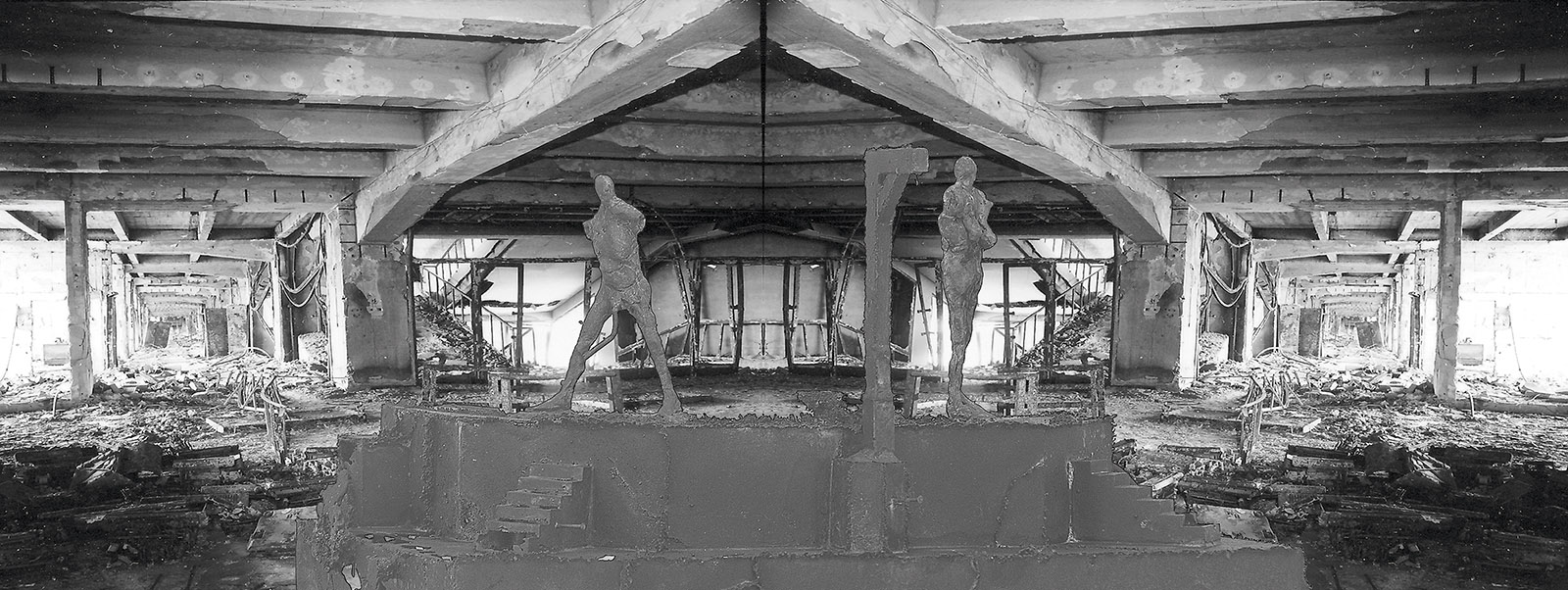 Jiří Sozanský, Popraviště (fotokoláž), 50 x 130 cm, 2014